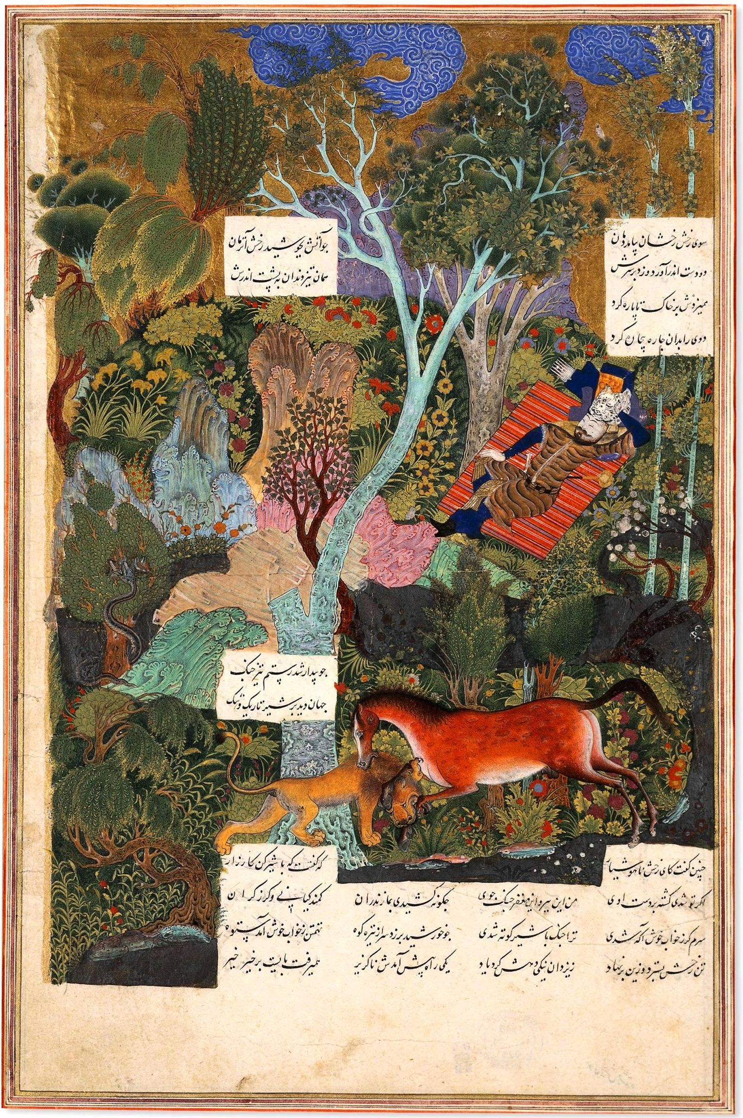 Султан Мухаммед. Спящий Рустам. Миниатюра, 1515—1522 годы. Шахнаме, Фирдоуси. Лондон, Британский музей.